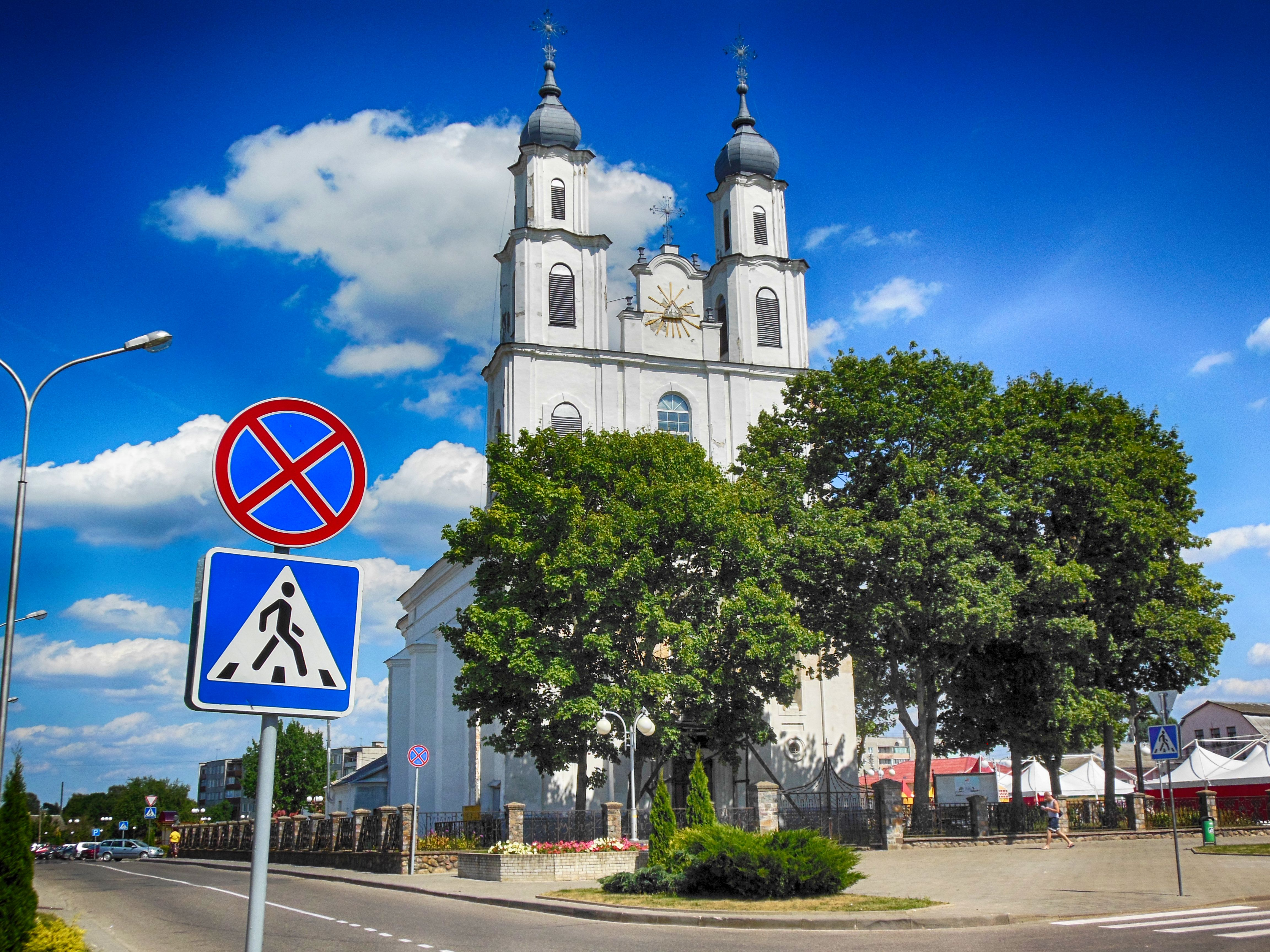 Беларуская (тарашкевіца): Касьцёл Унебаўзяцьця Найсьвяцейшай Панны Марыі. г. Дзятлава This is a photo of Belarusian heritage monument. Reference number: 412Г000231 ( WLM)